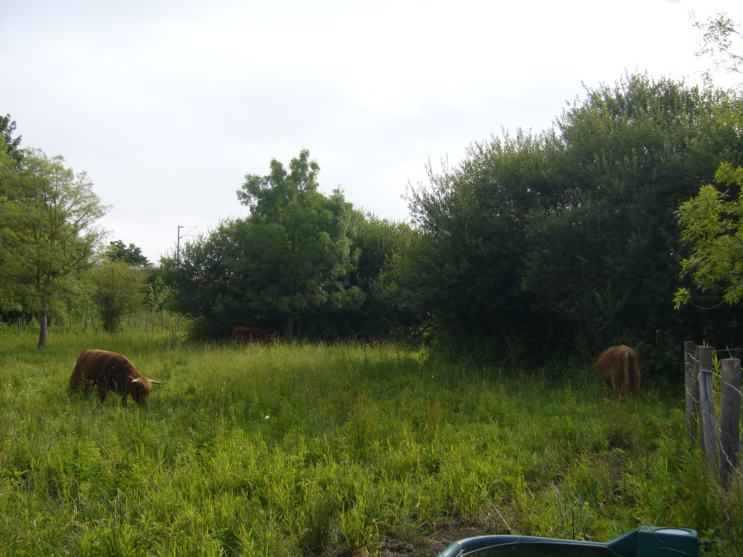 Vaches paturant dans la Petite Amazonie nantaise devant les voies ferrées surélevées en arrière fond.